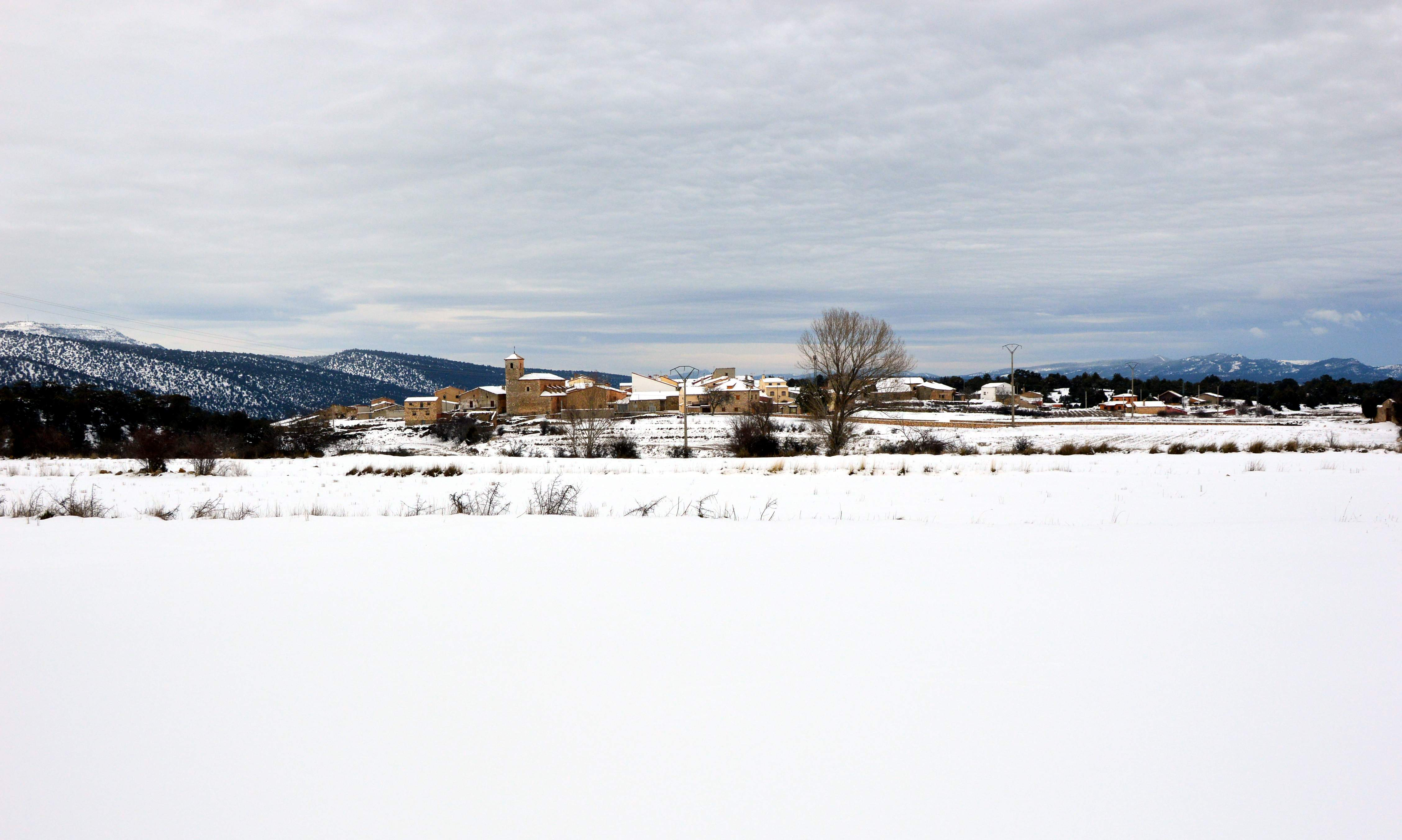 Vista general (meridional) de Veguillas de la Sierra (Teruel), tras la nevada de enero de 2017.